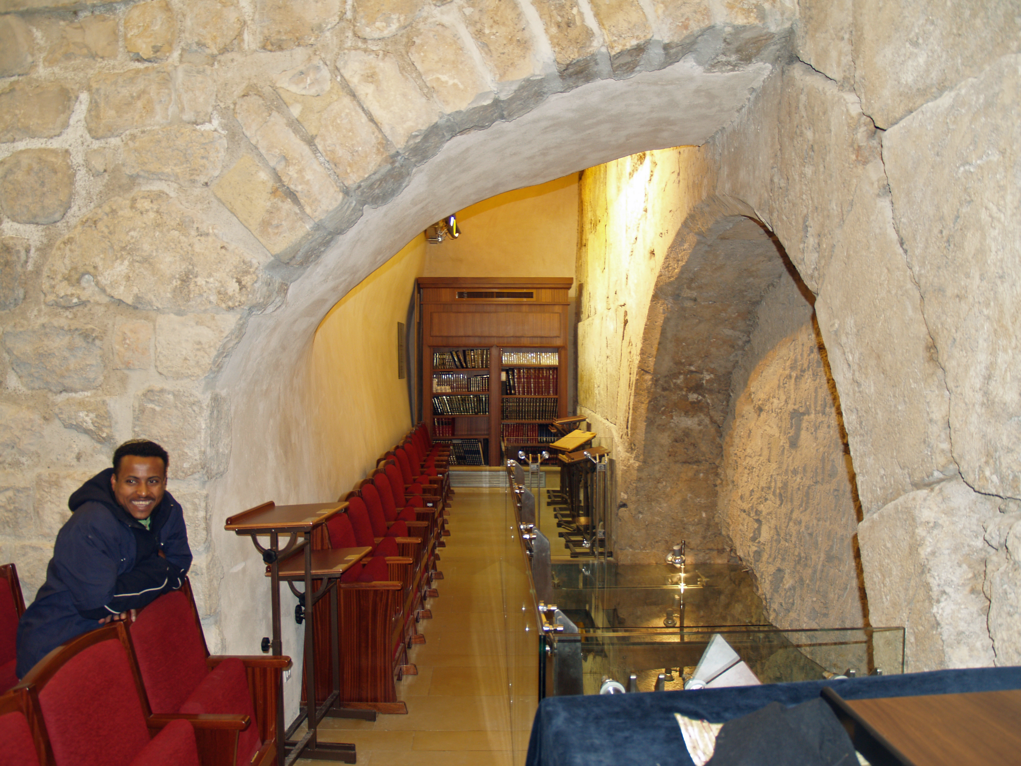 The Rav Getz Synagogue inside the Western Wall tunnel in Jerusalem